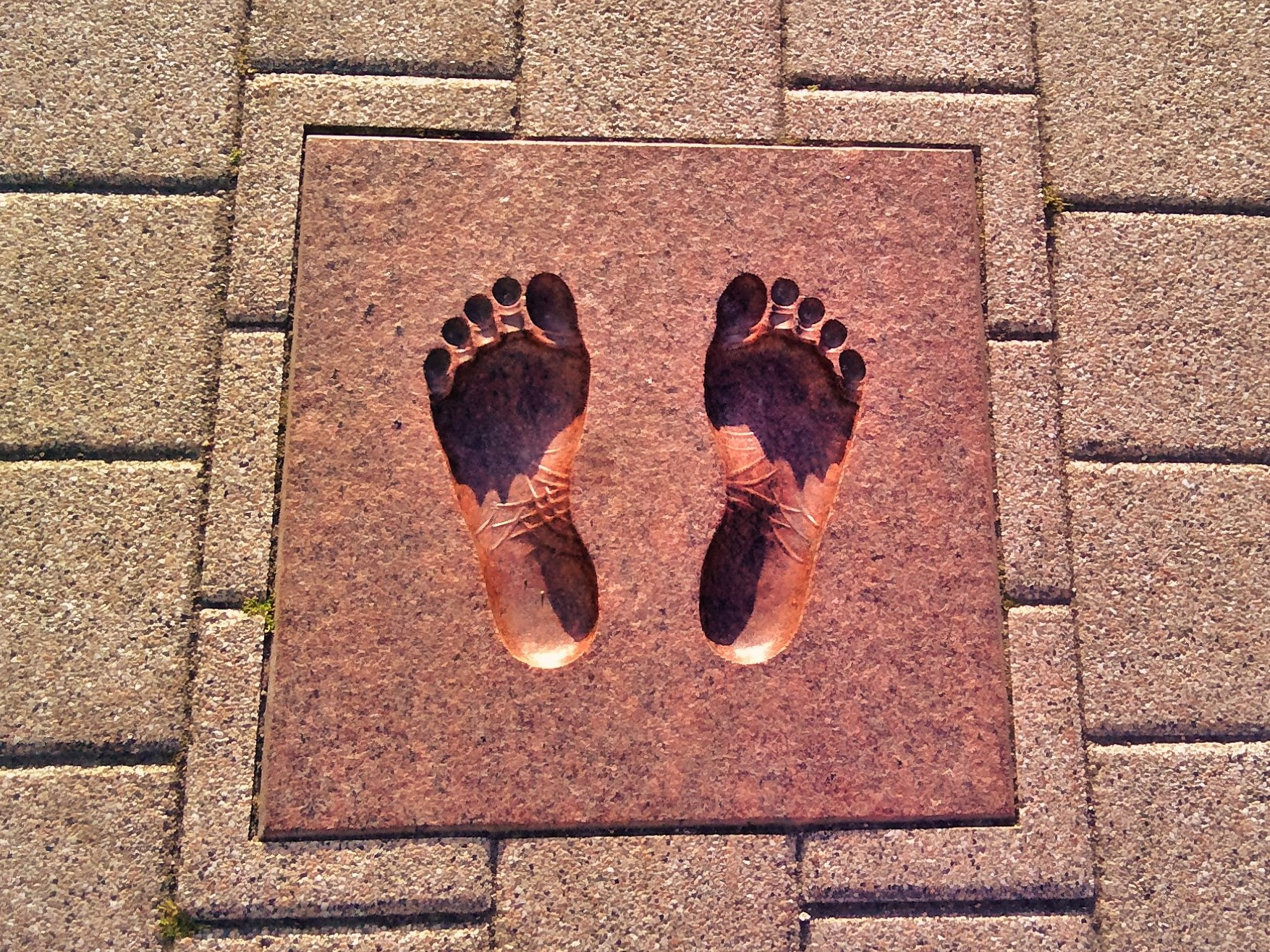 Dalle avec l'empreinte des pieds d'un participant inconnu à la Voie baltique.